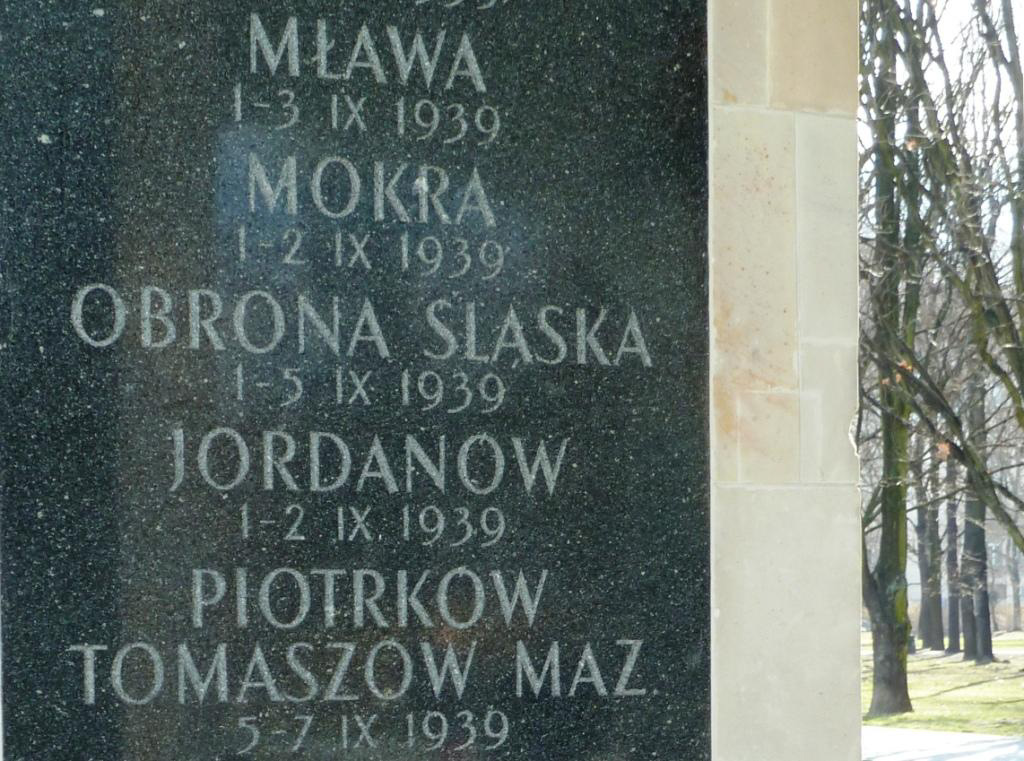 Tablica na Grobie Nieznanego Żołnierza w Warszawie - upamiętnienie bitew kampanii wrześniowej 1939 r.: Mława, Mokra, Obrona Śląska, Jordanów, Piotrków, Tomaszów Mazowiecki